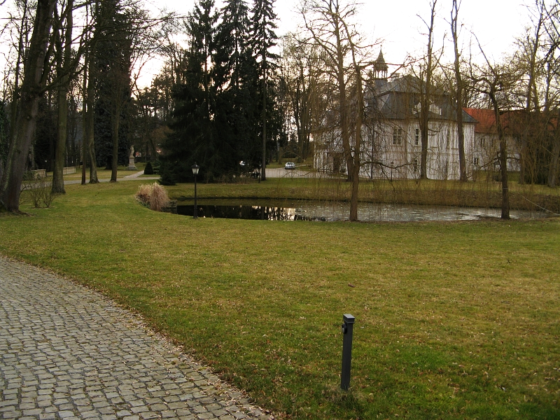 Zámek Jablonná, Jablonná 1, Neveklov.